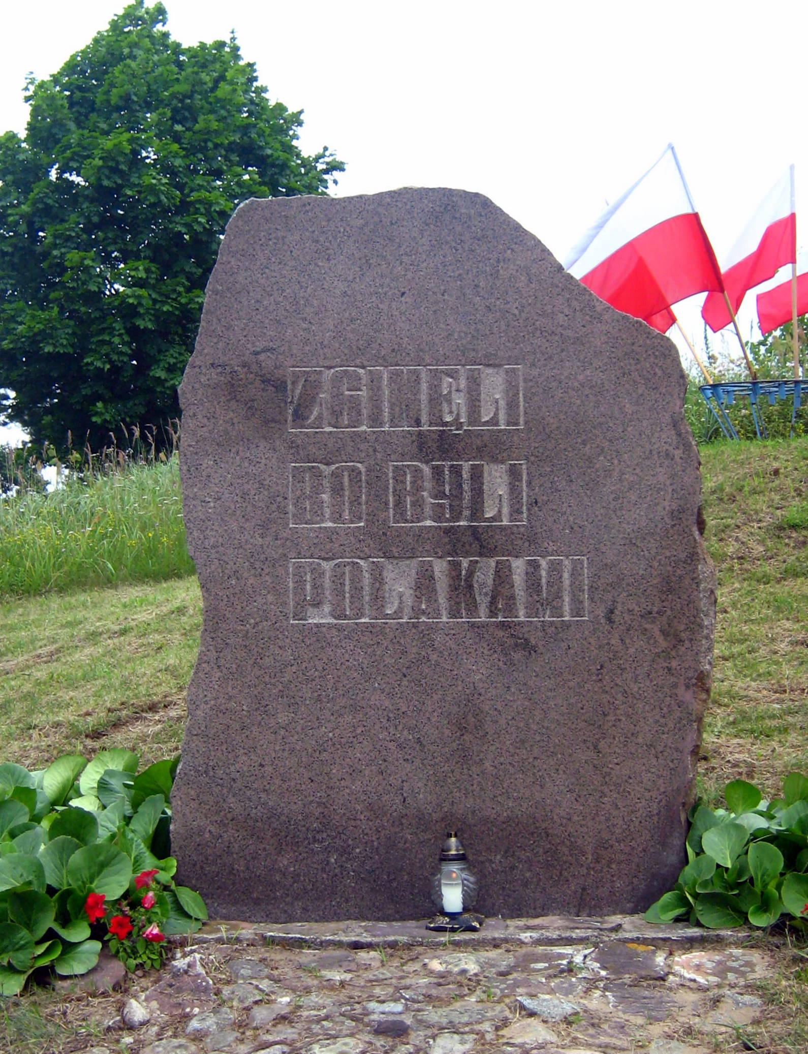 Tablica na wzgórzu w Gibach. Na tablicy napis: ZGINĘLI, BO BYLI POLAKAMI